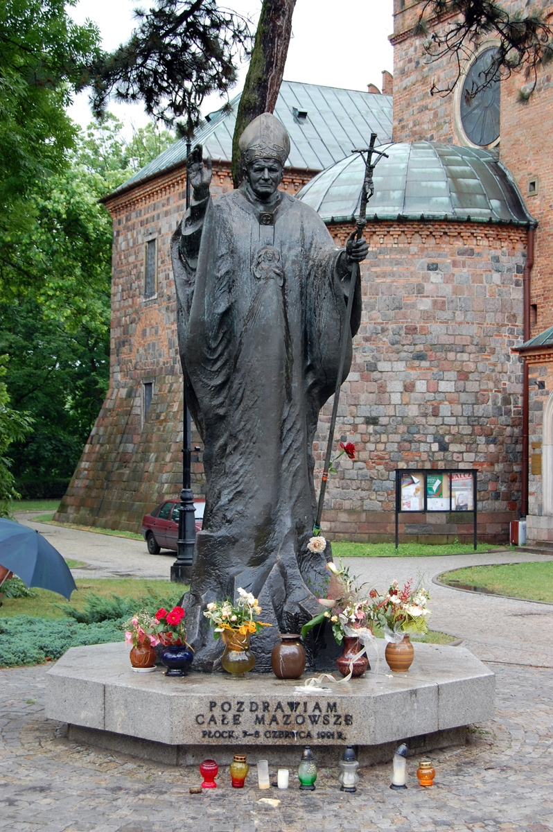 Pomnik Papieża Jana Pawła II w Płocku